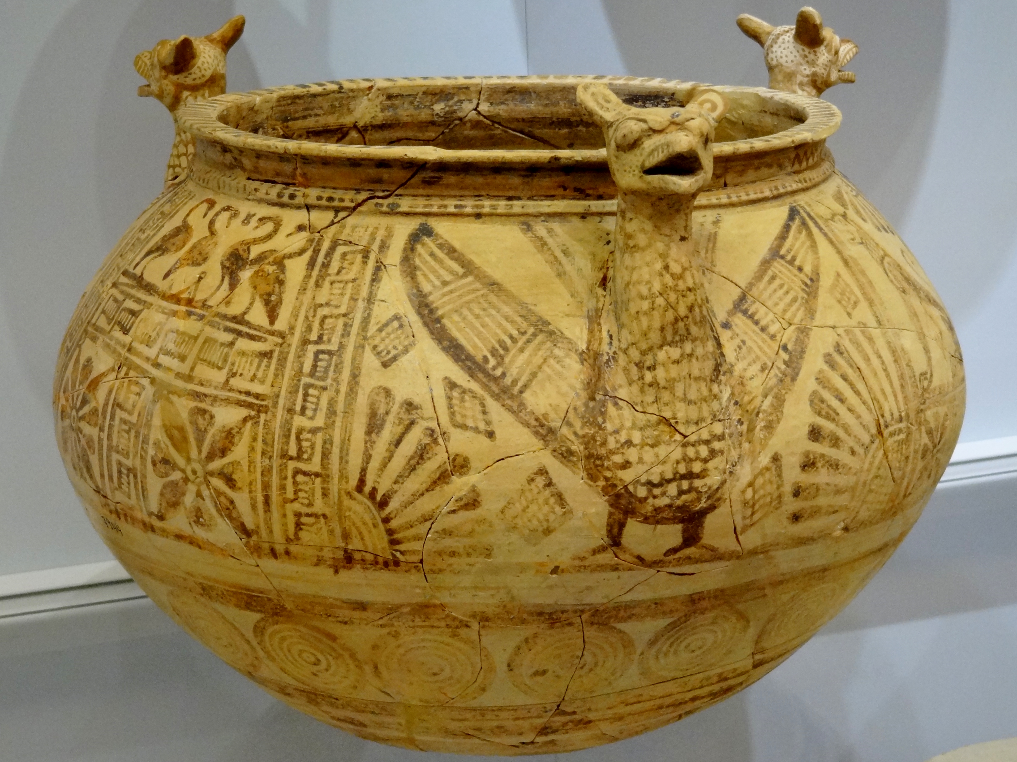 Kesselförmiges Mischgefäß (Lebes) mit plastischen Greifen-Protomen aus der Nekropole von Afrati (orientalisierender Stil, frühe archaische Zeit, 7. Jahrhundert v. Chr.), ausgestellt im Archäologischen Museum Iraklio, Kreta, Griechenland